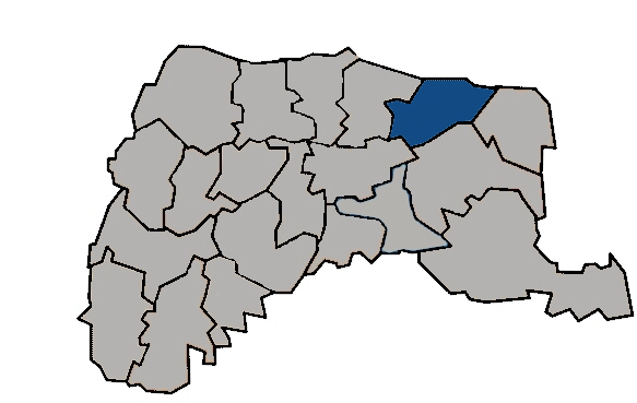 台灣省雲林縣莿桐鄉 KaurJmeb於2005年1月28日為編輯zh:莿桐鄉所繪製